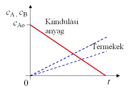 A koncentráció változása az idő függvényében a nulladrendű reakció során.